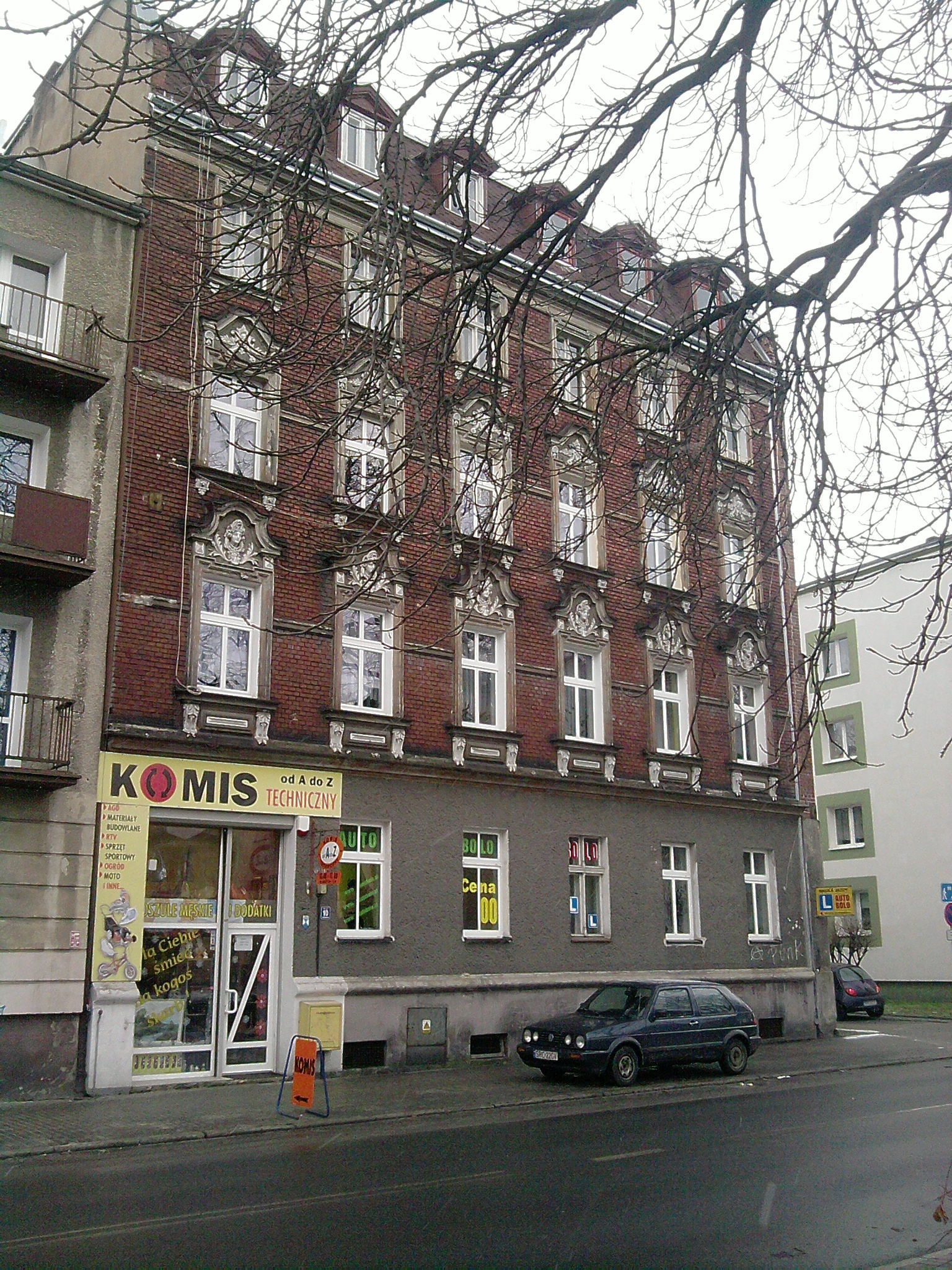 Racibórz, ul. Ogrodowa 10 - kamienica